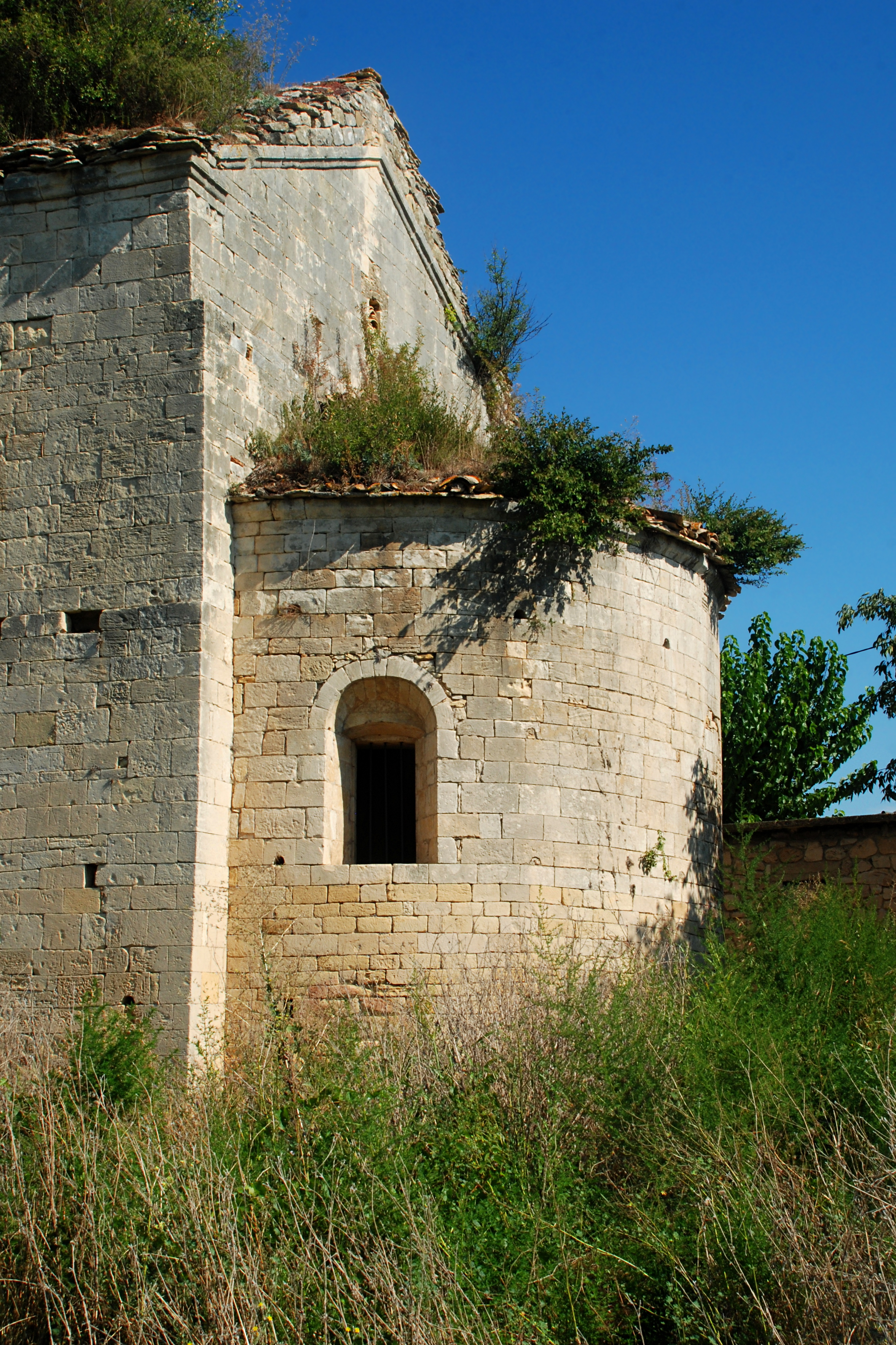 France - Gard - Bagnols-sur-Cèze - Chapelle Saint-Thyrse de Maransan